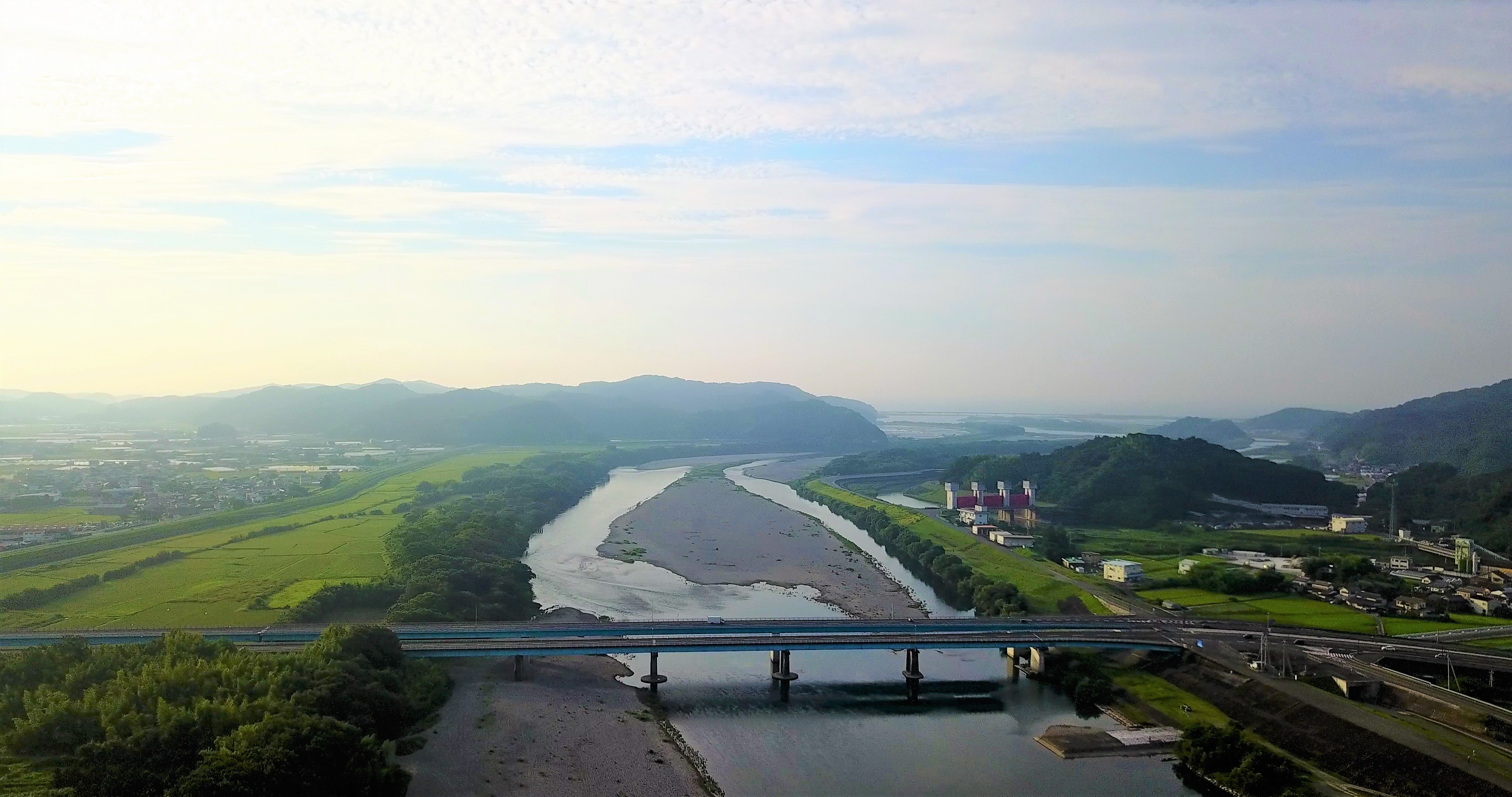 仁淀川大橋は1本だったが土佐市バイパスの開通により上下線2本となった。下流側が新仁淀川大橋。